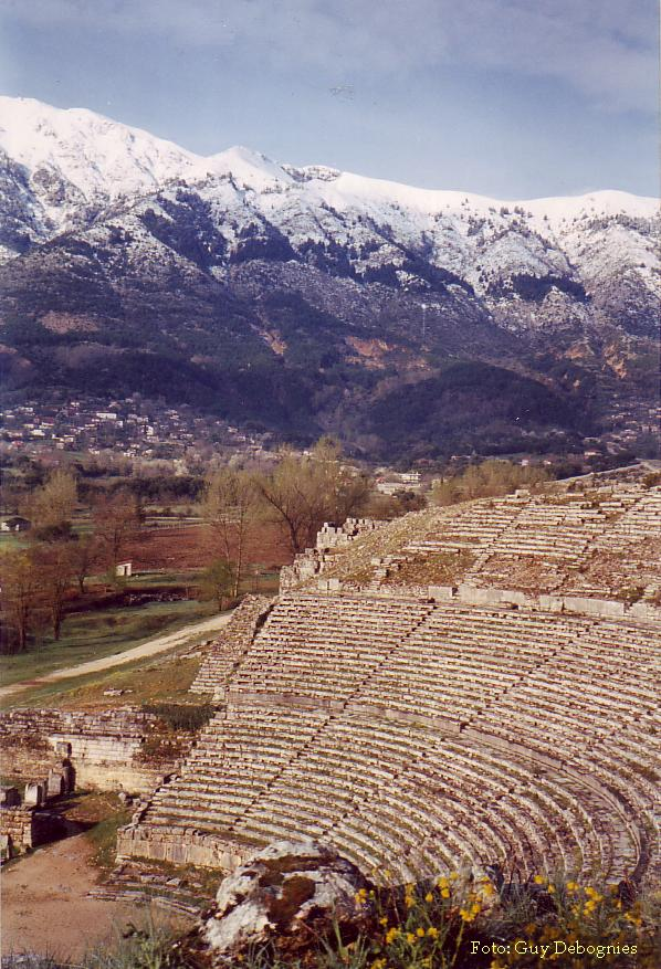 Dodoni Eigen foto (paasvakantie 1994)